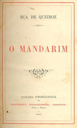 Primeira edición da novela O Mandarim (1880) do escritor portugués Eça de Queirós (1845-1900), co seguinte texto: EÇA DE QUEIROZO MANDARIM1880